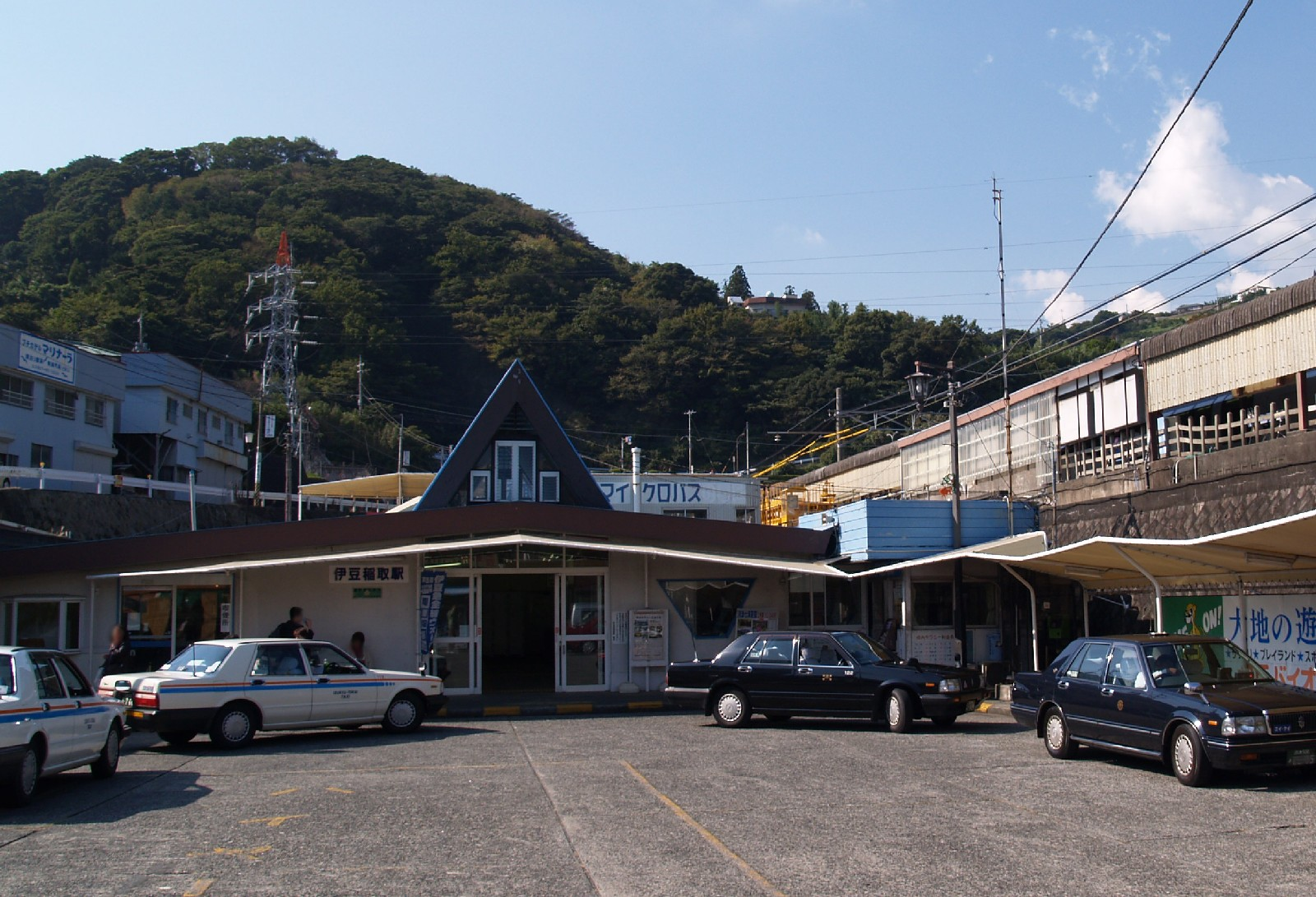 伊豆稲取駅。中央に駅舎、右側にホームがある